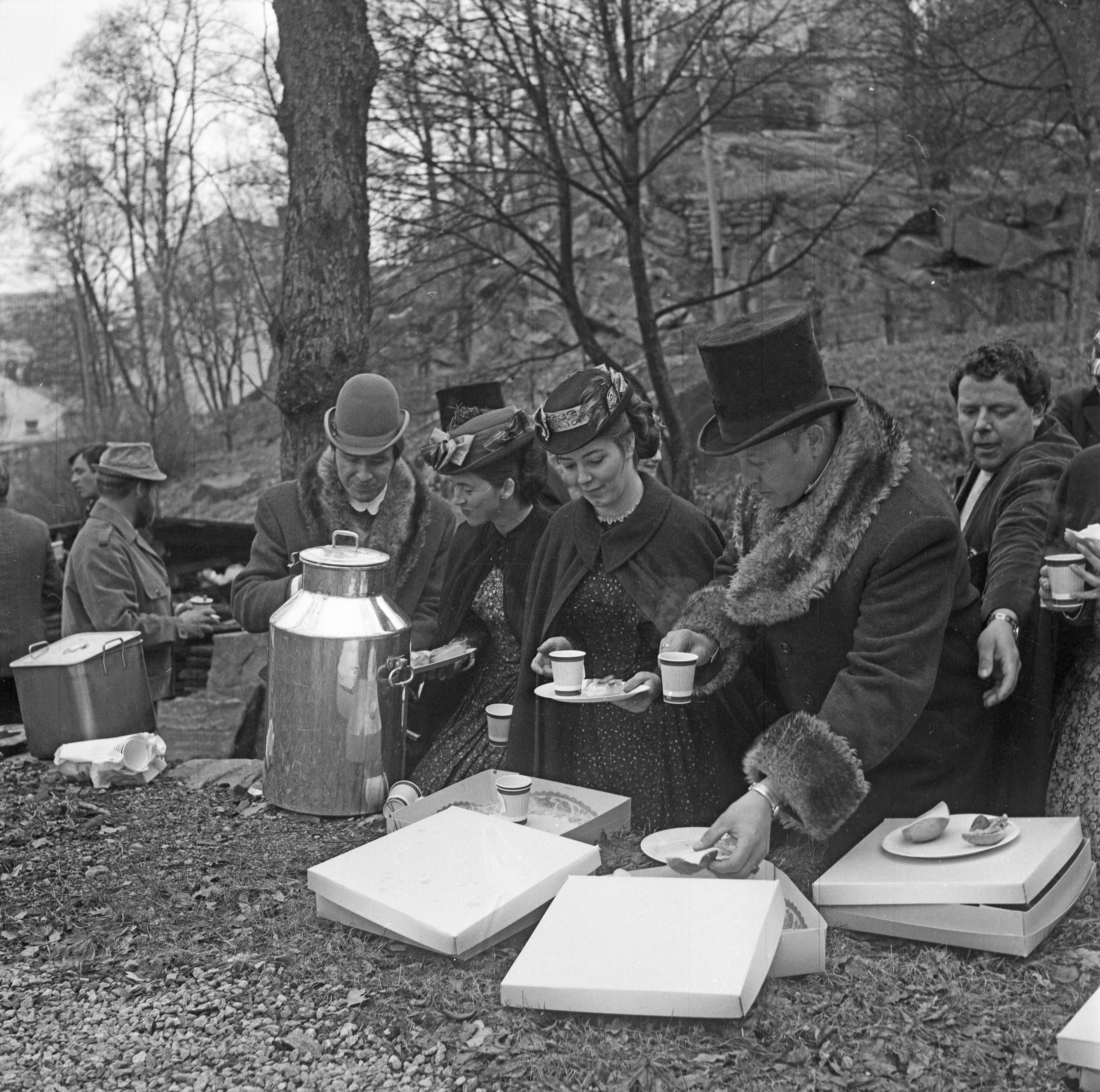 Format: 120 mm sort/hvitt negativ Dato / Date: April 1969 Fotograf / Photographer: Eirik Sundvor (1902 - 1992) Sted / Place: Bergen, Hordaland Wikipedia: Song of Norway (film) Wikipedia: Statist Eier / Owner Institution: Trondheim byarkiv, The Municipal Archives of Trondheim Arkivreferanse / Archive reference: Tor.H43.B78. Merknad: Statister på filmsettet til "Song of Norway" i Bergen. Flere av statistene jobbet på "Hotel Norge" hvor filmteamet bodde. Deler av filmen ble innspilt i Bergen i april 1969, og filmen ble utgitt i USA den 4 November 1970. Toralv Maurstad spilte hovedrollen som Edvard Grieg. Florence Henderson, mest kjent som Carol Brady i "The Brady Bunch", spilte Edvard Griegs framtidige kone Nina Hagerup. Regissøren omtalte Henderson som den nye Julie Andrews.